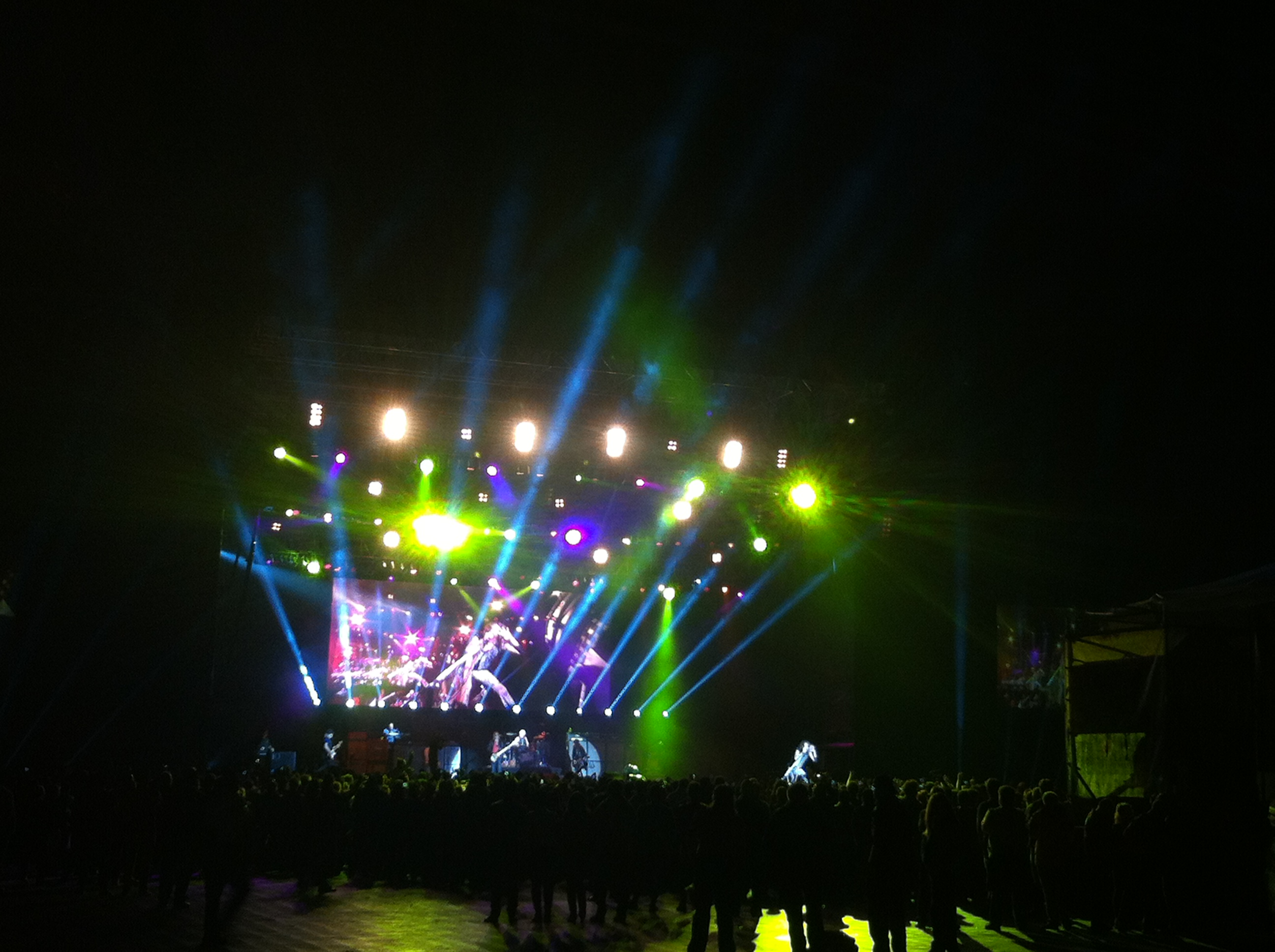 Aerosmith en Costa Rica 2013